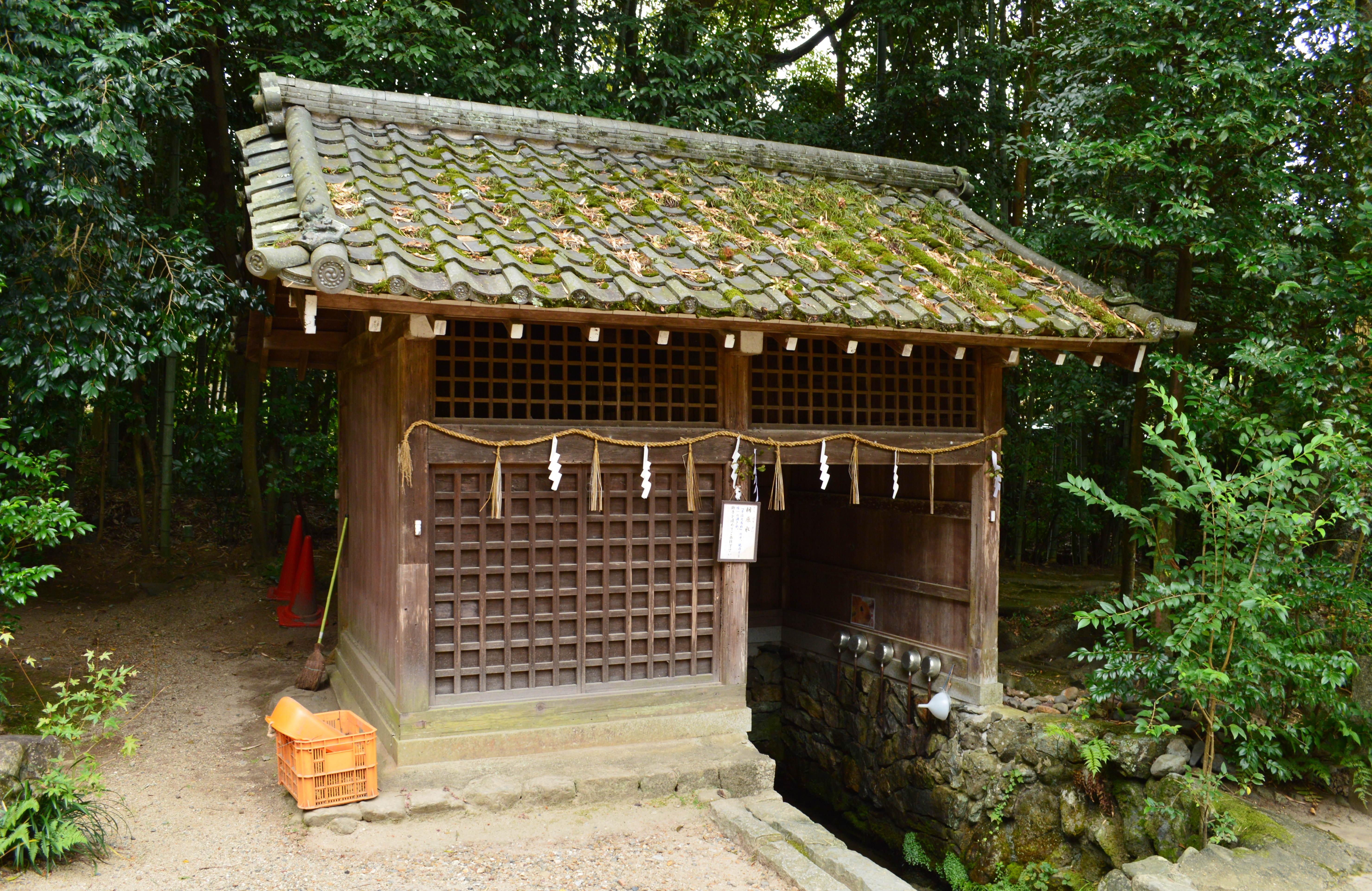 宇治上神社 桐原水